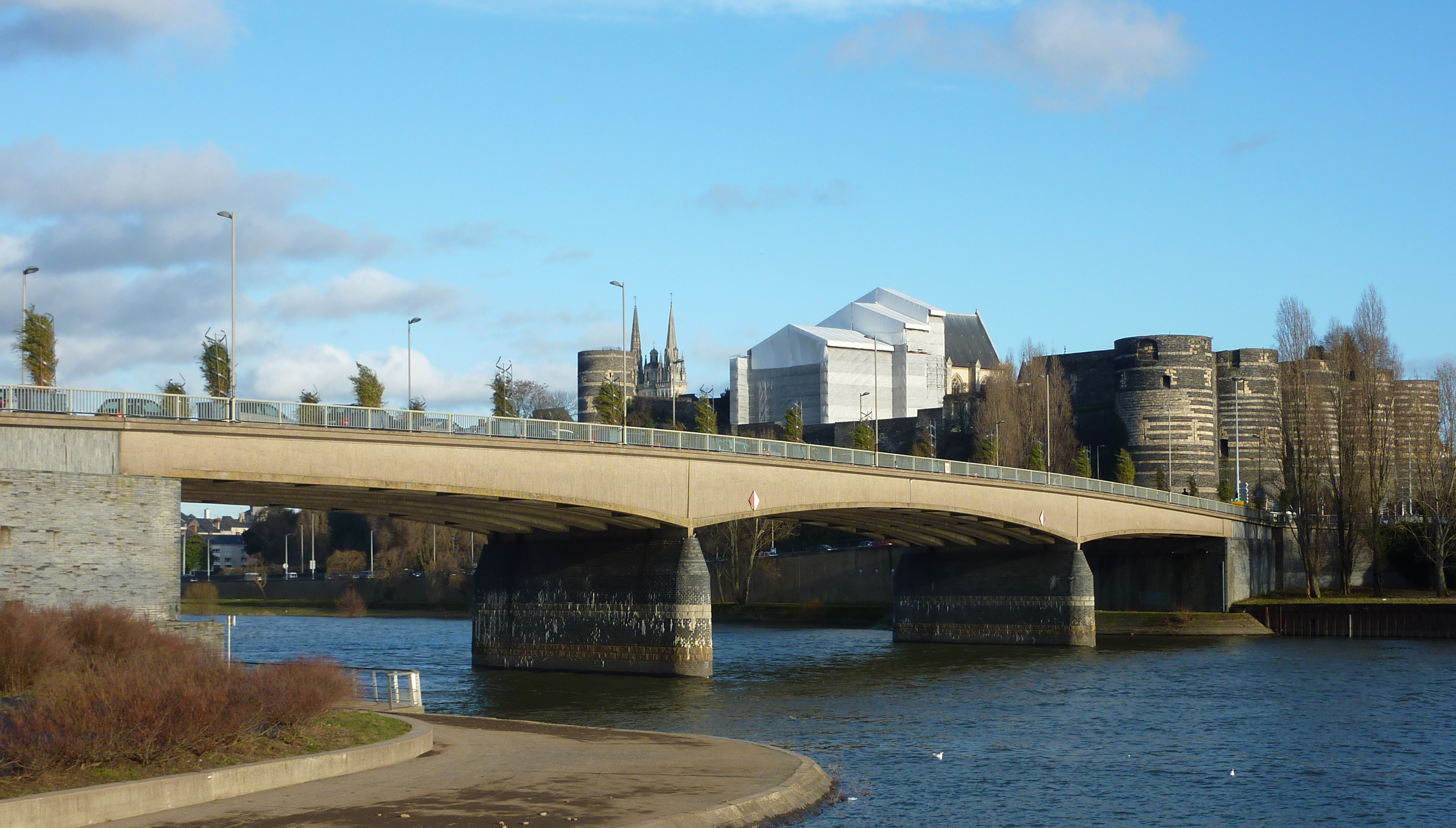 Vue d'ensemble avec le Château d'Angers en arrière plan